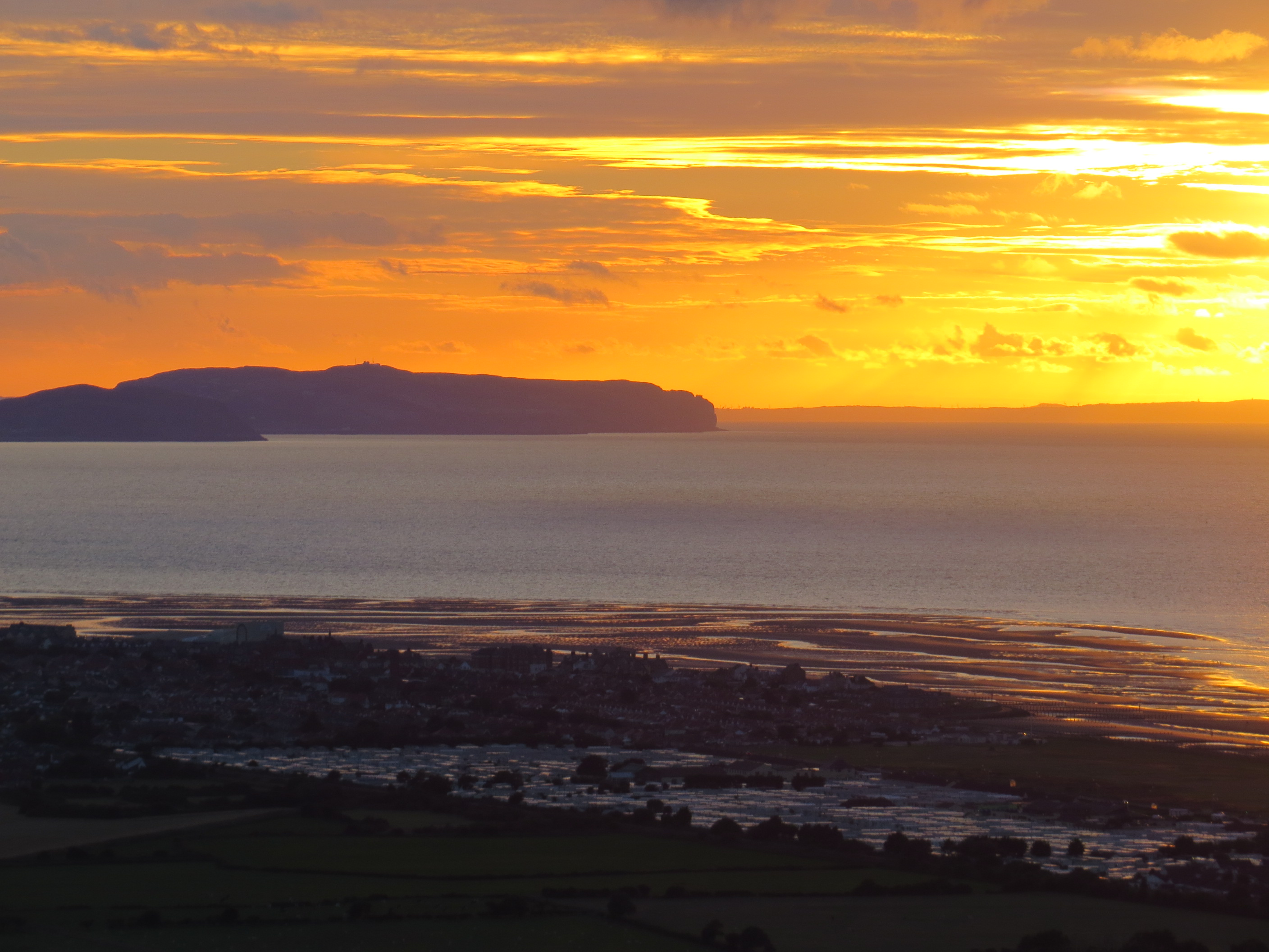 y Rhyl a'r Gogarth o faes parcio Gwaenysgor